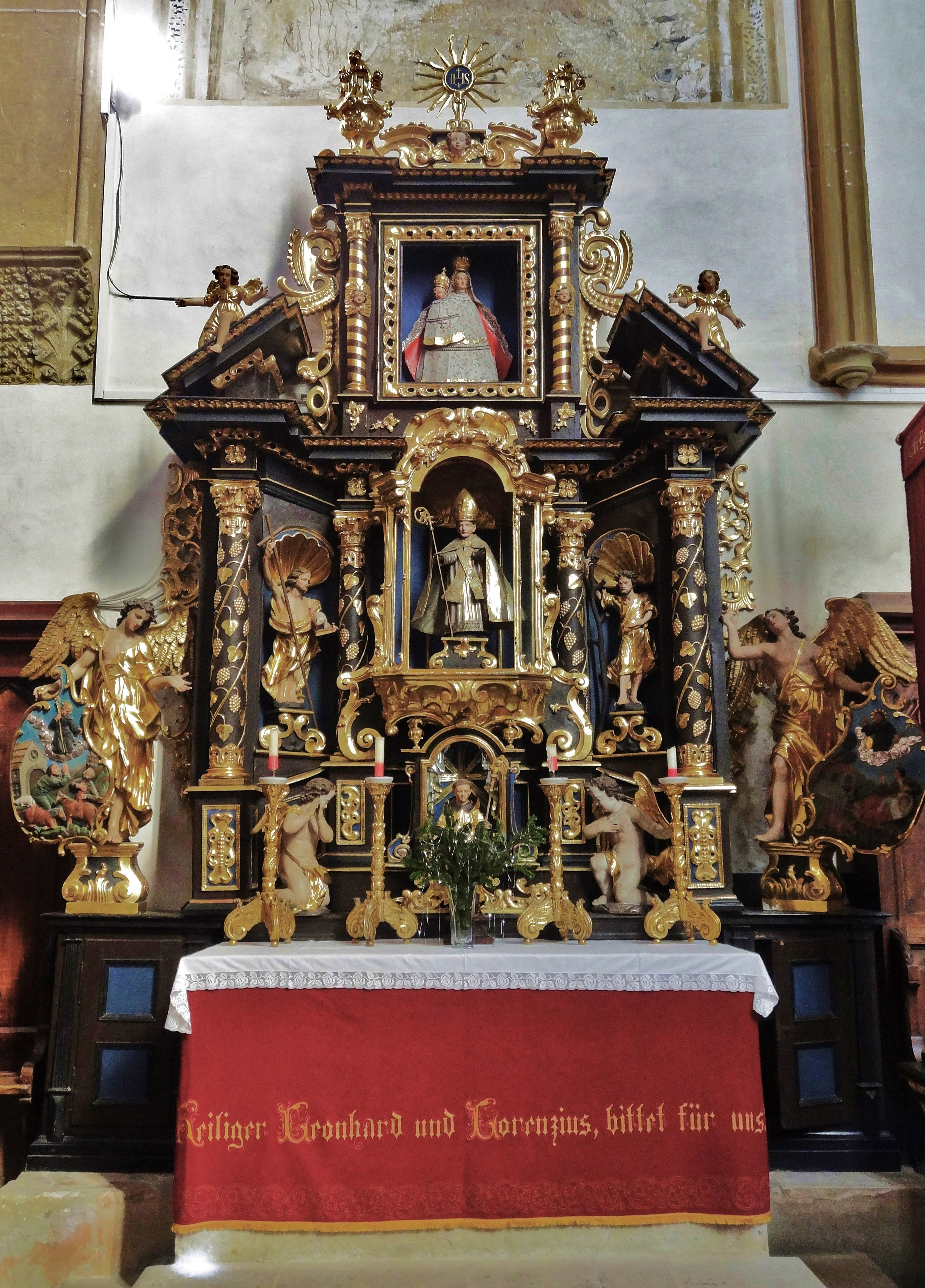 Kath. Pfarrkirche St. Leonhard im Lavanttal, Leonhardi-Altar (17. Jahrhundert)